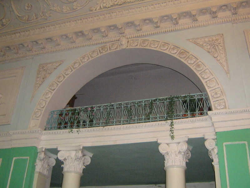 Балкон для оркестру